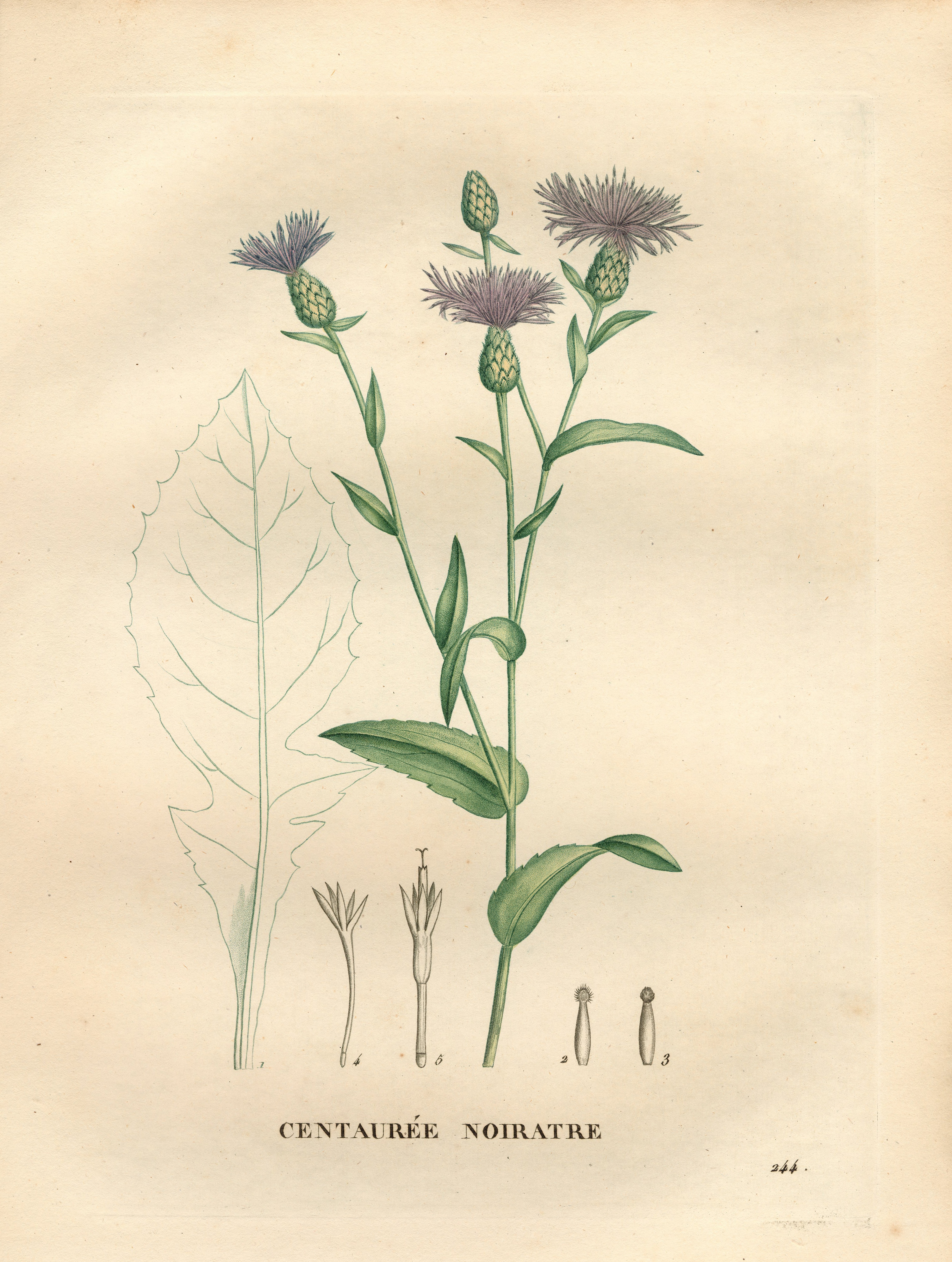 Legende: Oberer Teil der Pflanze. 1 Basales Blatt. 2 Äußeres Hüllblatt. 3 Inneres Hüllblatt. 4 Äußere Röhrenblüte. 5 Innere Röhrenblüte.